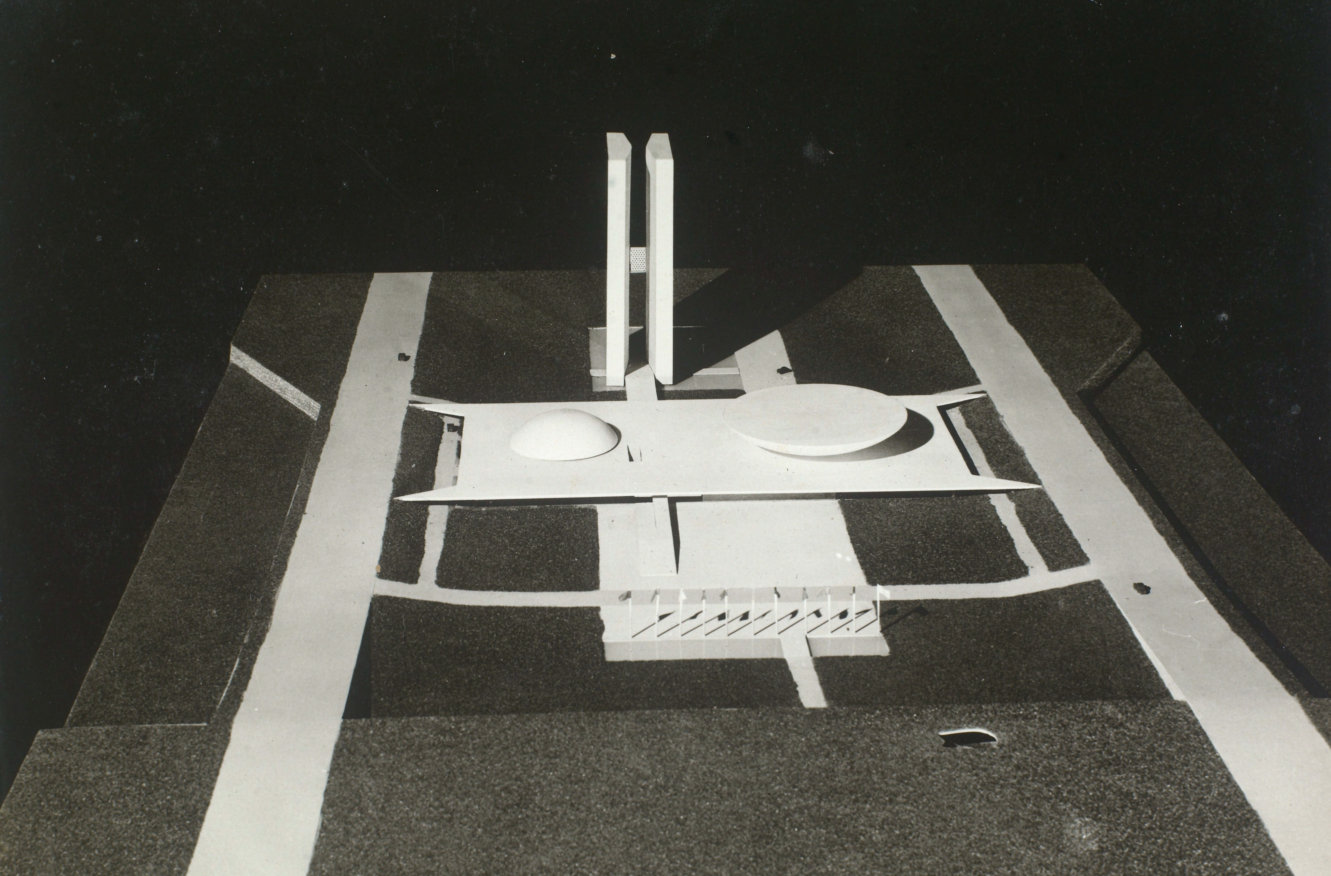 Fotografia do Fundo Correio da Manhã, sob a guarda do Arquivo Nacional.